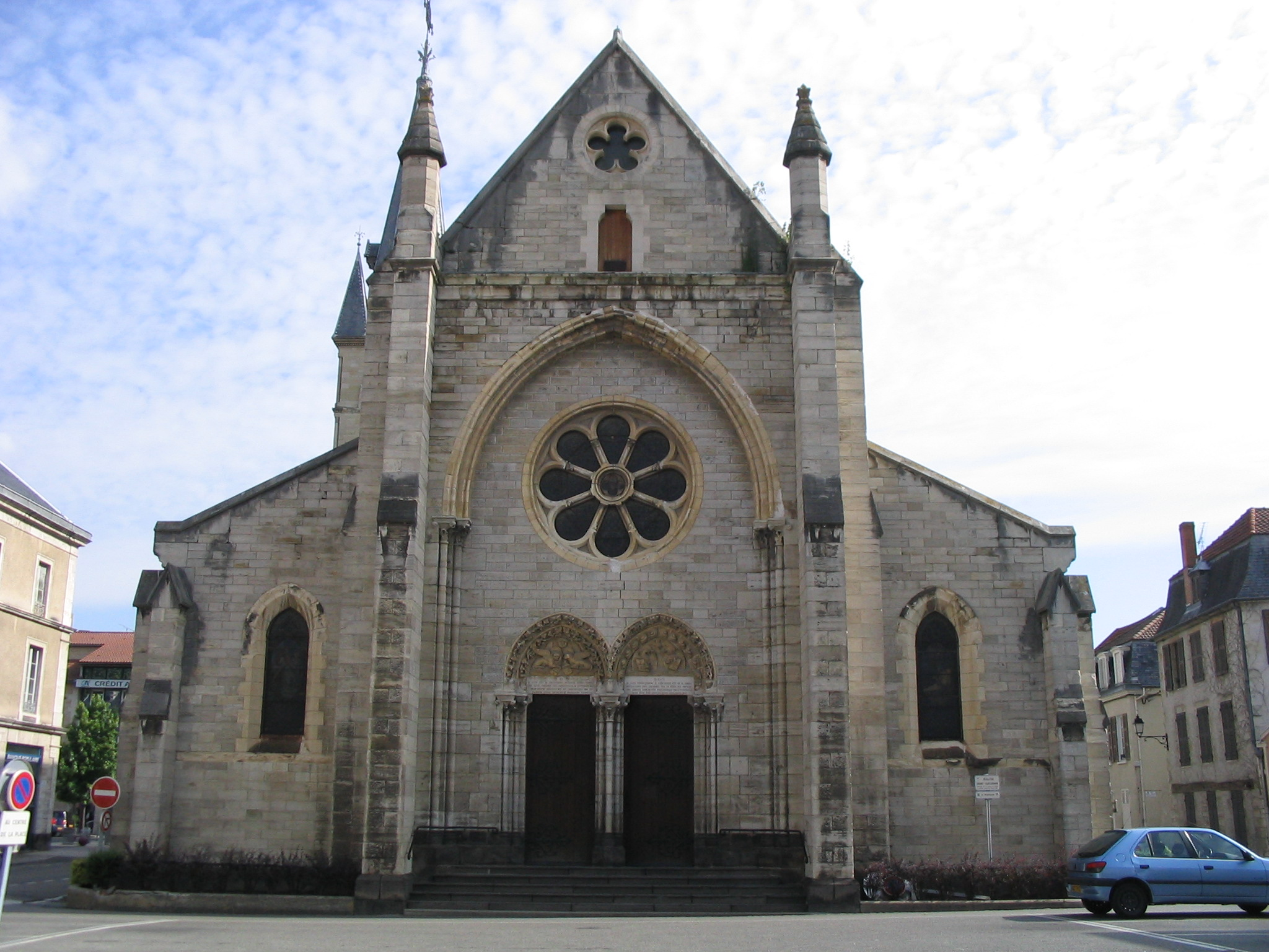 L'église Saint Saturnin à Cusset, place Victor Hugo.